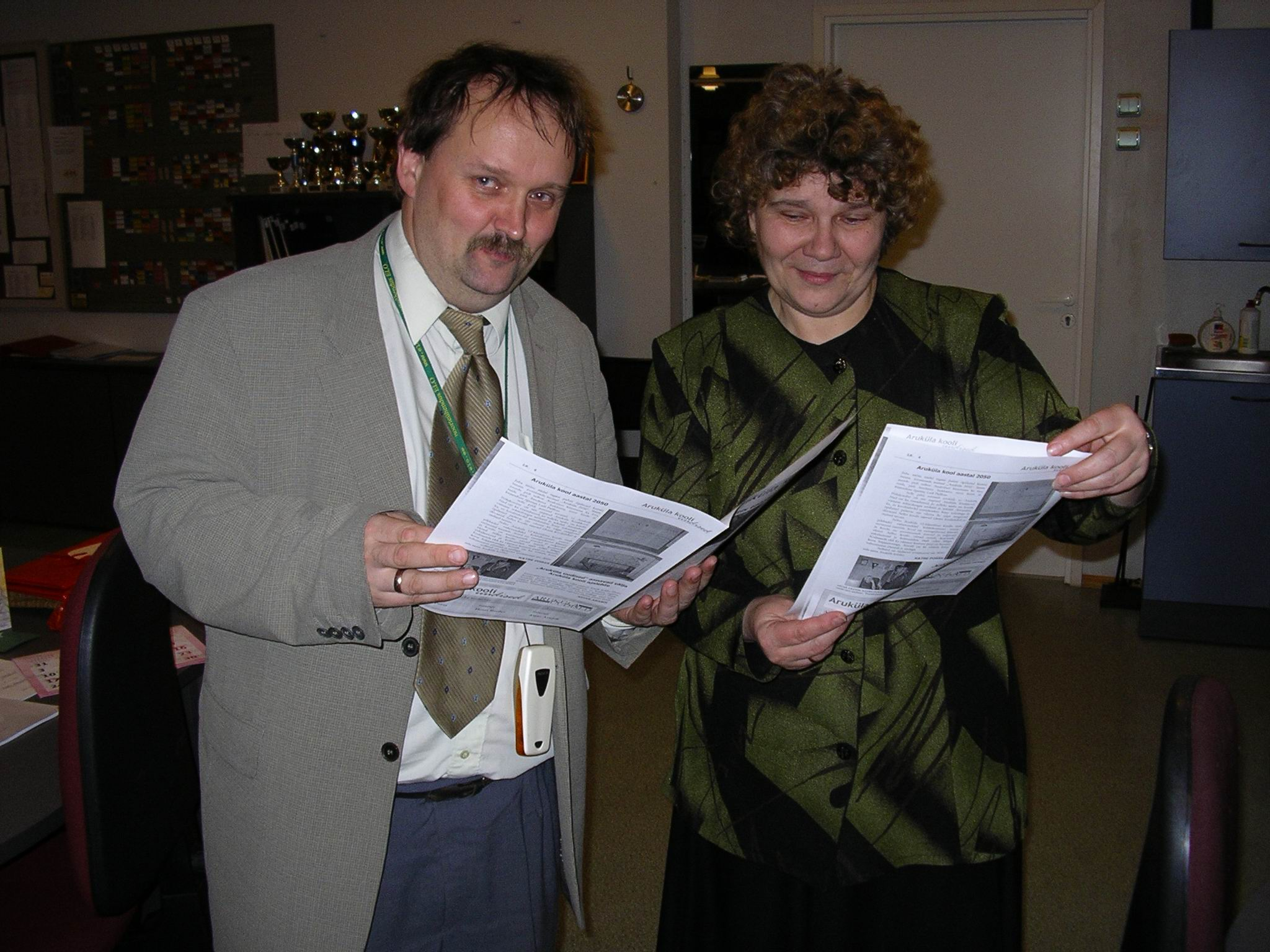 Aruküla Põhikooli direktor ja õppealajuhataja